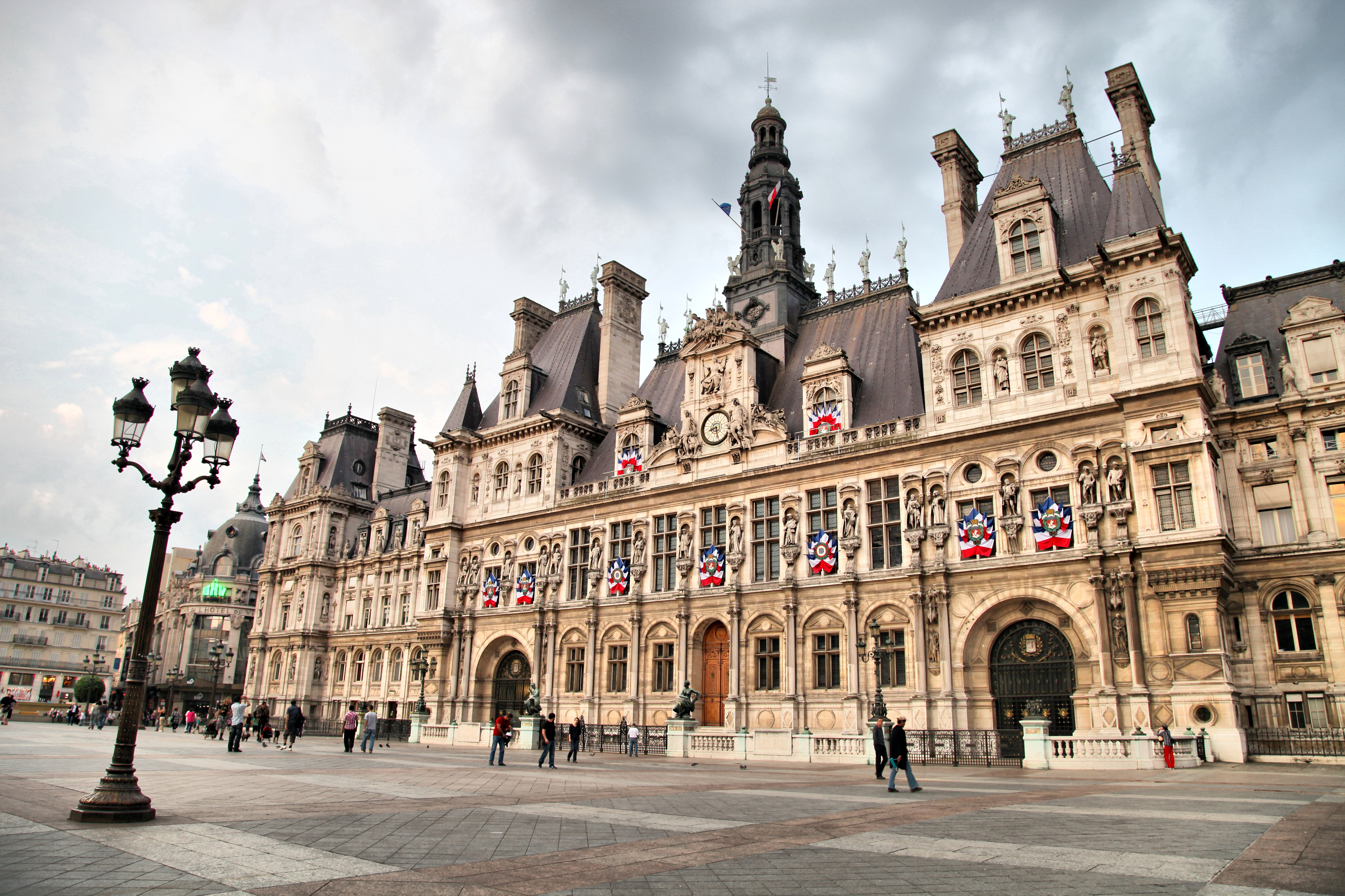 Paris